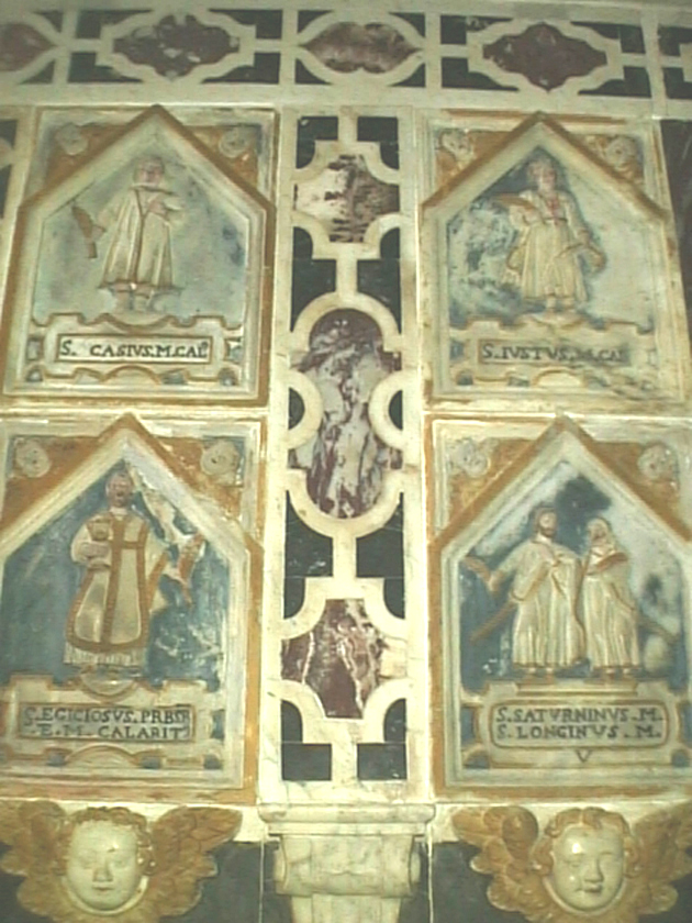 Santuario dei Martiri - Cagliari